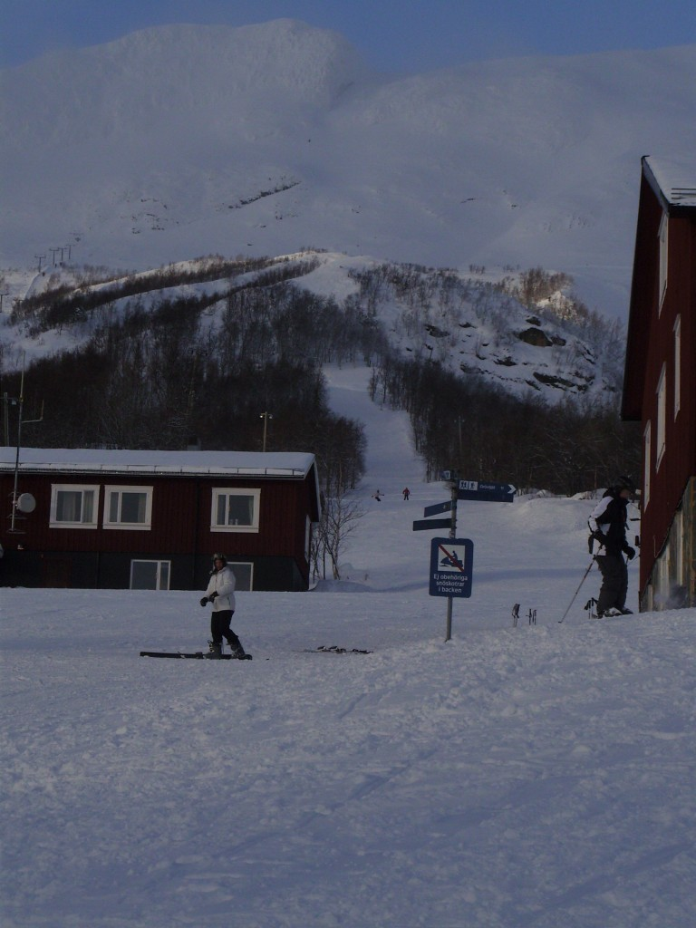 Kittelfjäll.